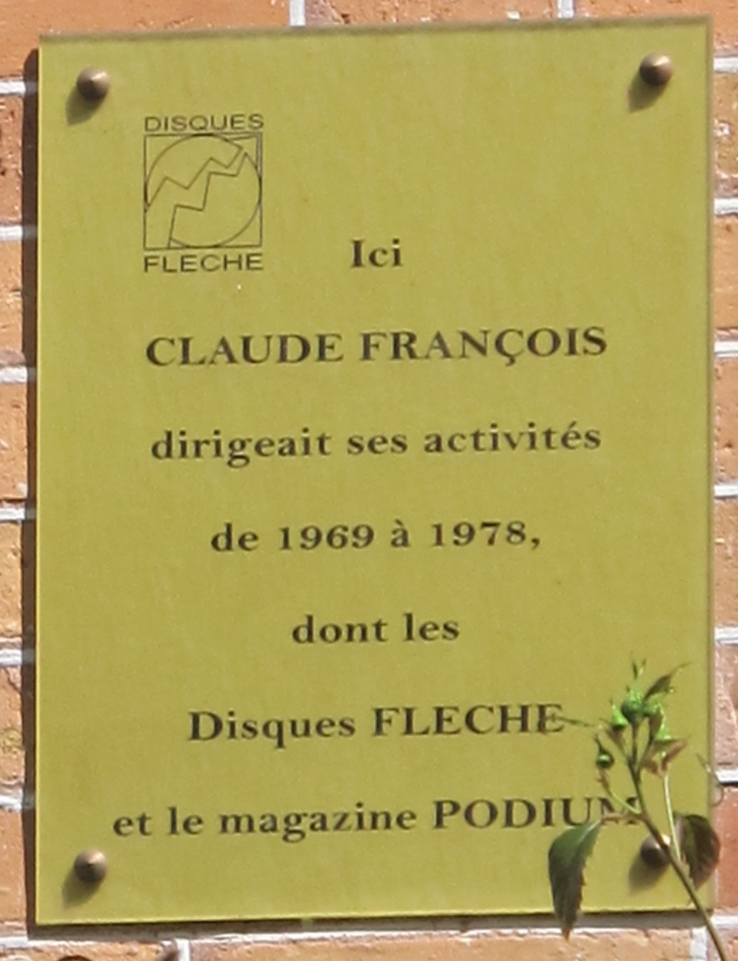 Plaque en hommage aux activités de Claude François, 122 boulevard Exelmans (Paris, 16e) : "Ici Claude François dirigeait ses activités de 1969 à 1978 dont les disques Flèche et le magazine Podium".